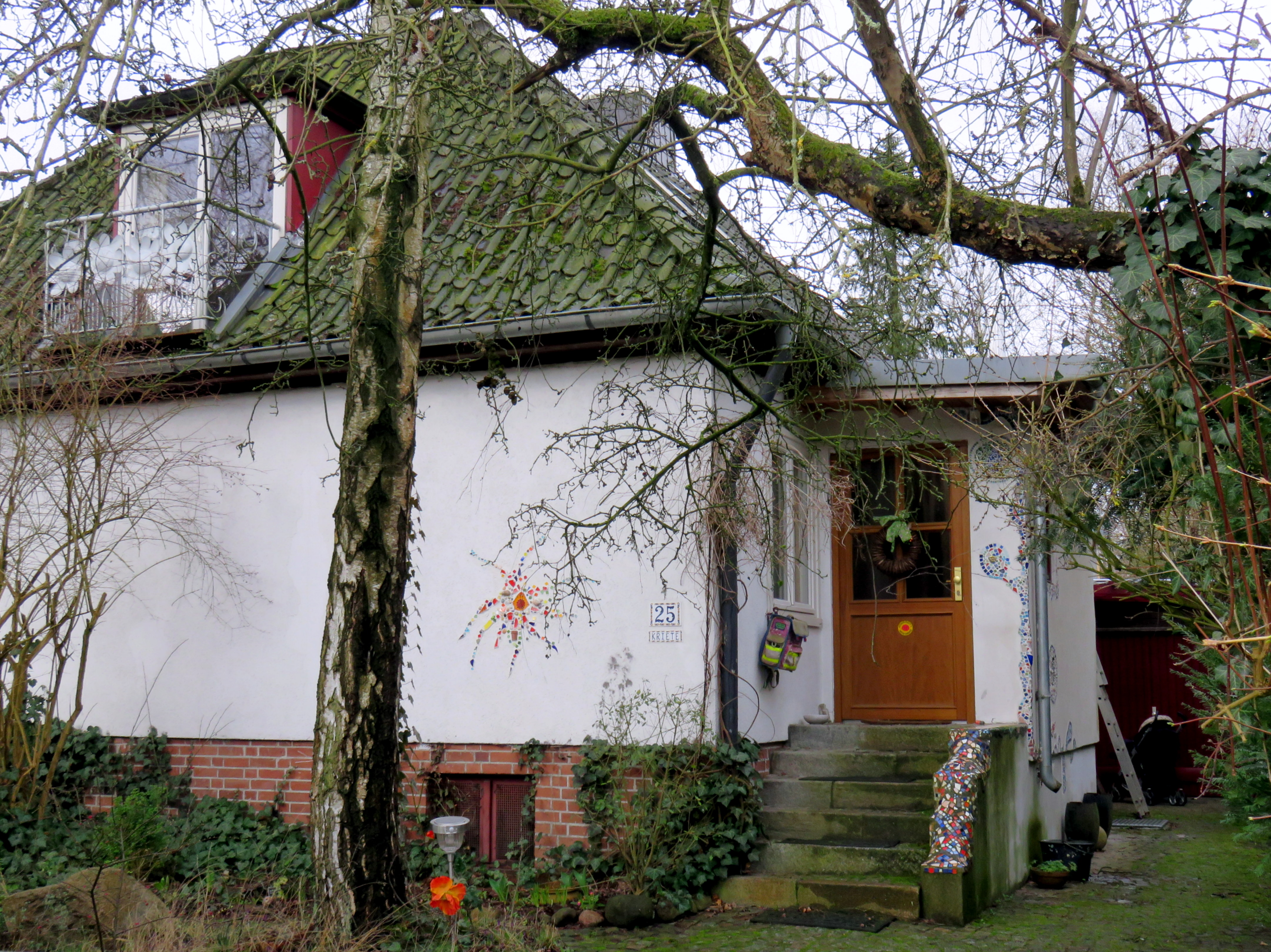 Baggesenstieg 25 in Hamburg-Poppenbüttel, ab 1970 Wohnhaus (mit Atelier) des deutschen Malers und Zeichners Carlo Kriete.